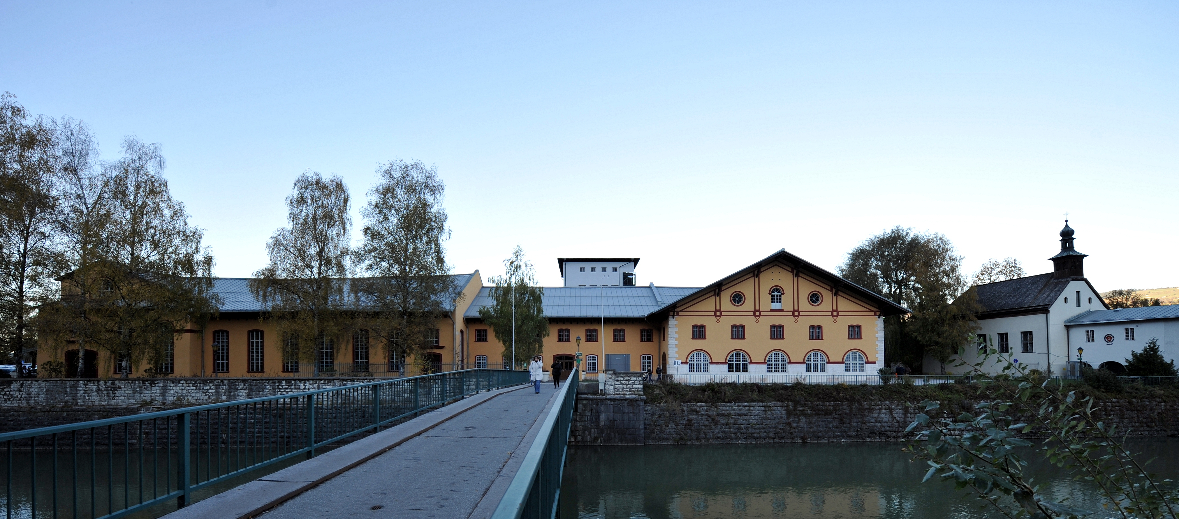 Sudhaus samt Sudpfanne und Salzmagazin, Hallein, Pernerinsel